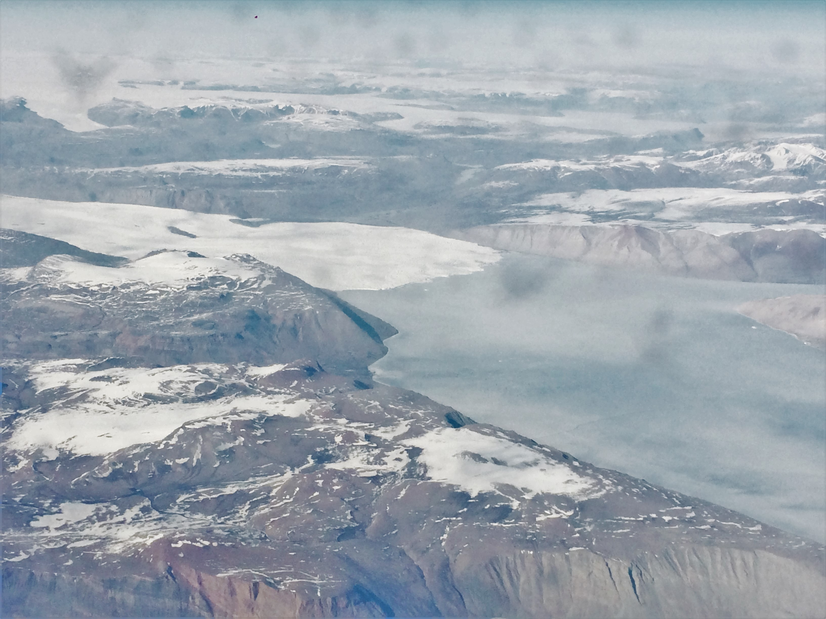 Nordfjord